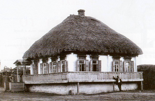 Казачий курень. 19 век.